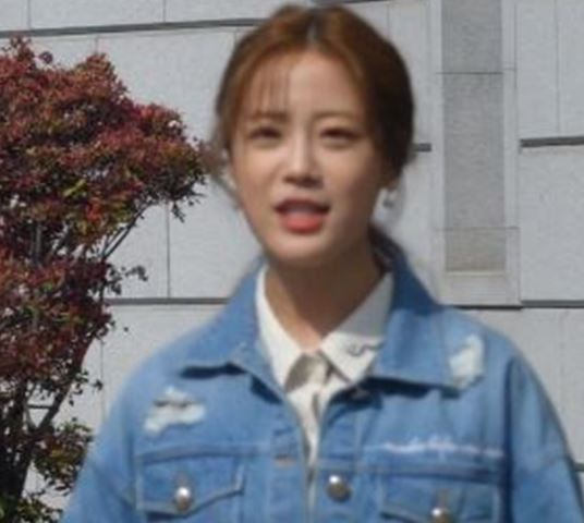 5월 11일 오전 서울시 영등포구 여의도동 KBS별관에서 '해피투게더4' 녹화가 진행됐다. 이날 녹화는 '쎈 언니가 돌아왔다' 특집으로 게스트 허송연 아나운서가 동생 허영지와 그리고 이주빈이 출근하고 있다.